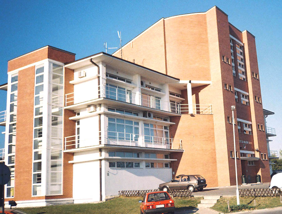 FABUS Institute in [:en:Sremka Kamenica], near Petrovaradin, Serbia L'Institut FABUS de Sremska Kamenica, près de Petrovaradin, Serbie